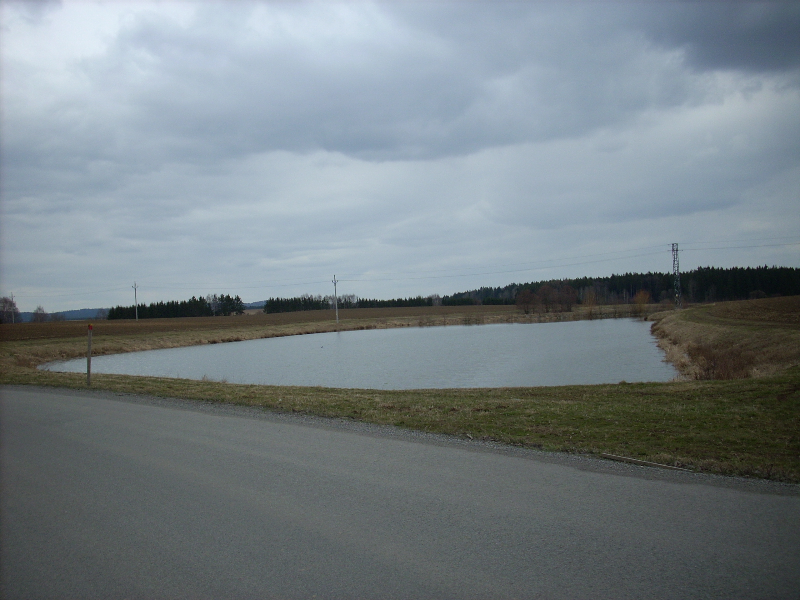 Ždírec (okres Jihlava), rybník V Kozlu